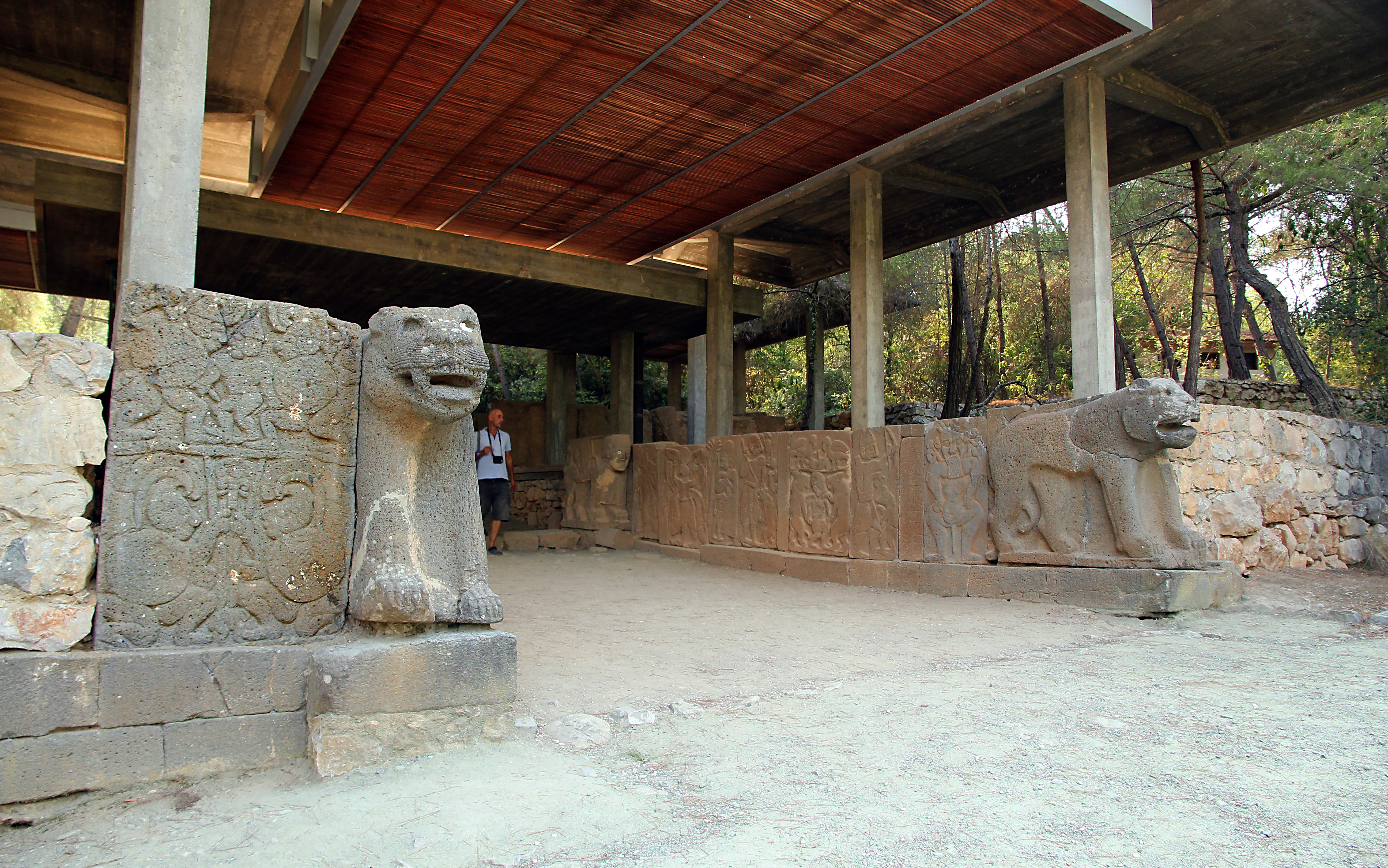 Karatepe (Asatiwataya), neo-hethitischer Fundort bei Osmaniye, Südtürkei, Nordtor